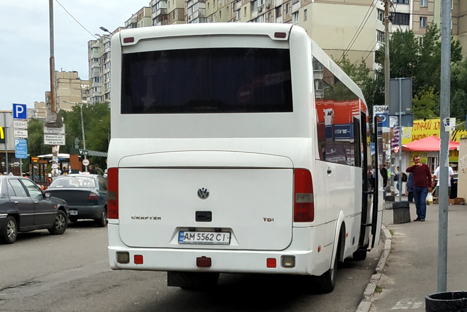 Автобус МТК А308.51 Sirius на шасси Volkswagen Crafter производства компании "Автотехнология". Автобус работает на линии Киев-Коростень. Киев, 2019 г.